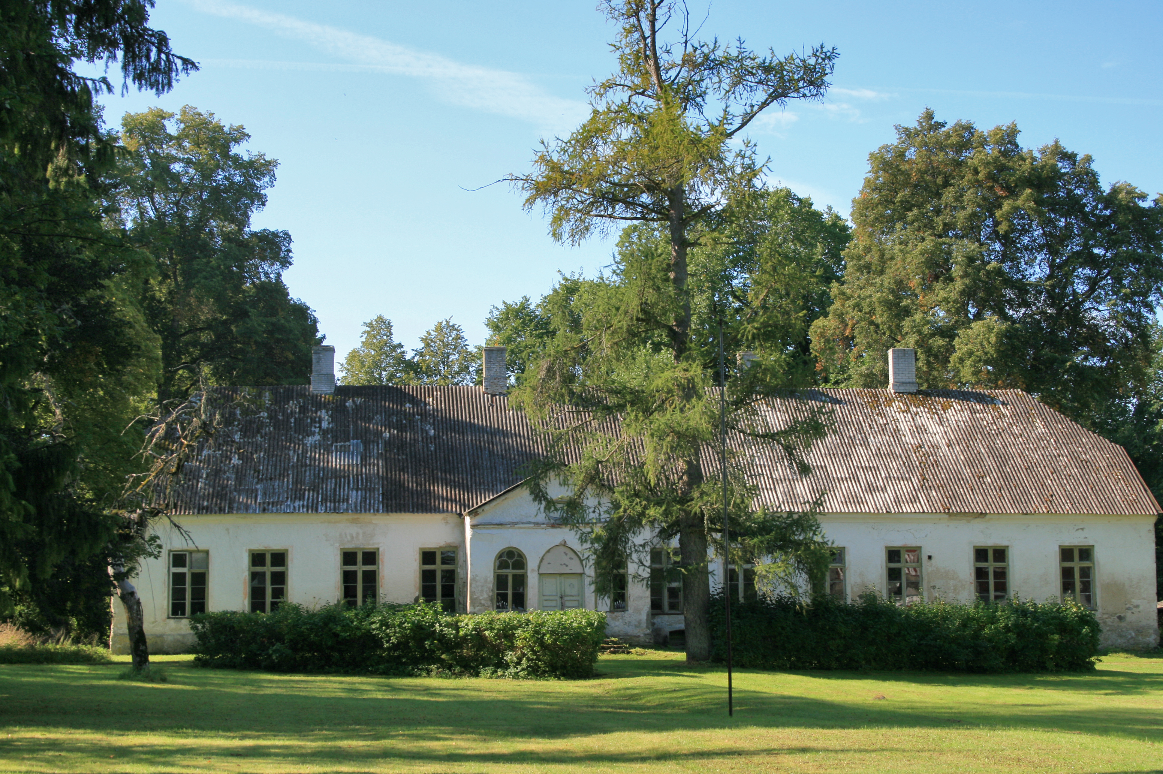 Putkaste mõisa peahoone, Martna kihelkond